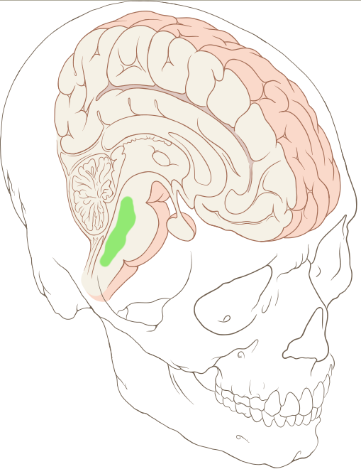 Núcleos del rafé: posición relativa dentro del encéfalo dentro de la cual se localizan los núcleos del rafé.